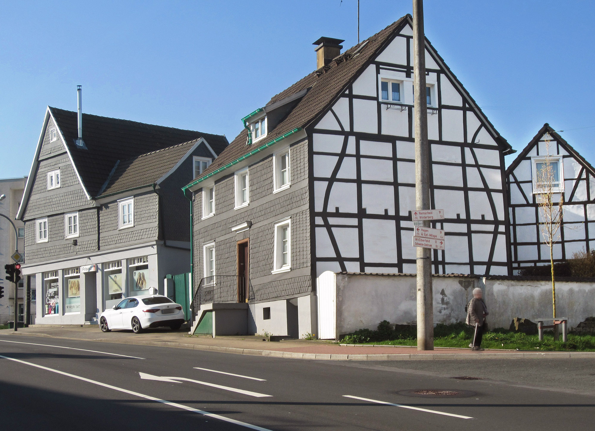 Baudenkmäler Möllenkotter Straße 2 (Mitte) und 4 (links), Schwelm.